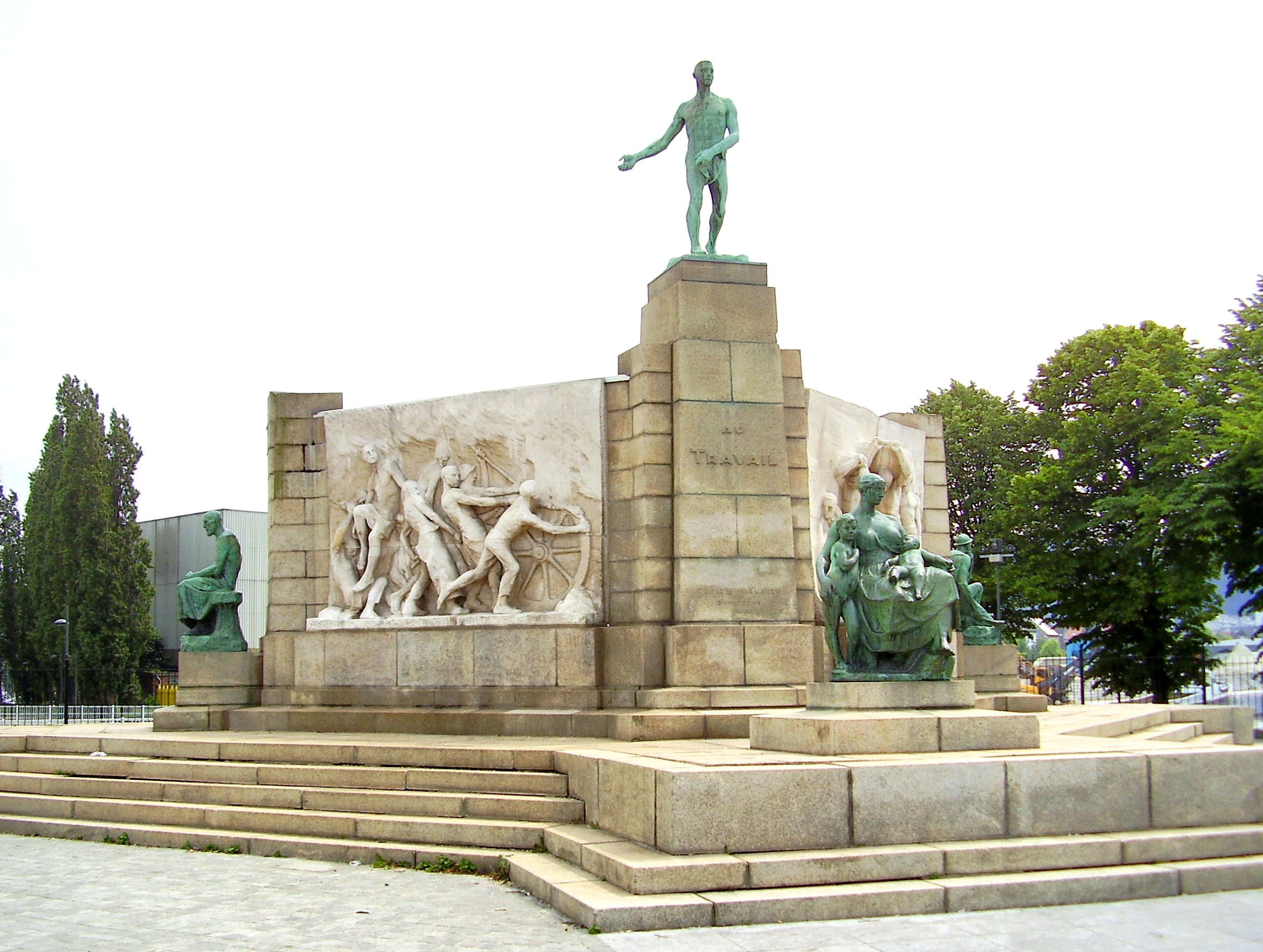 Description: Monument au Travail, Bruxelles - Sculptures de Constantin Meunier Author: User:Ben2 Date of creation: 20 juin 2006 Source: Photo personnelle